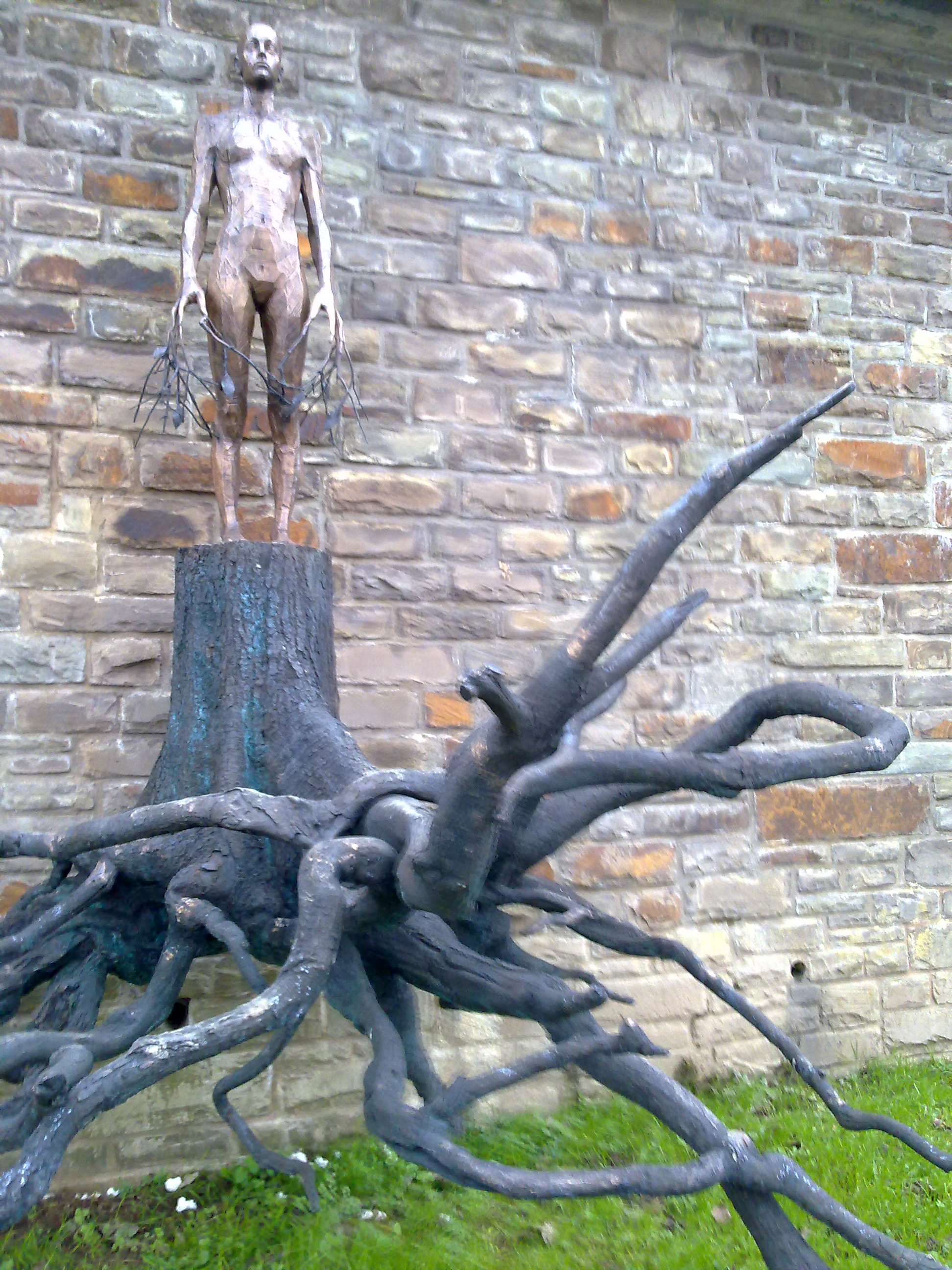 Aron Demetz: Heimat (Skulpturen-Ufer Remagen, Rheinkilometer 635)